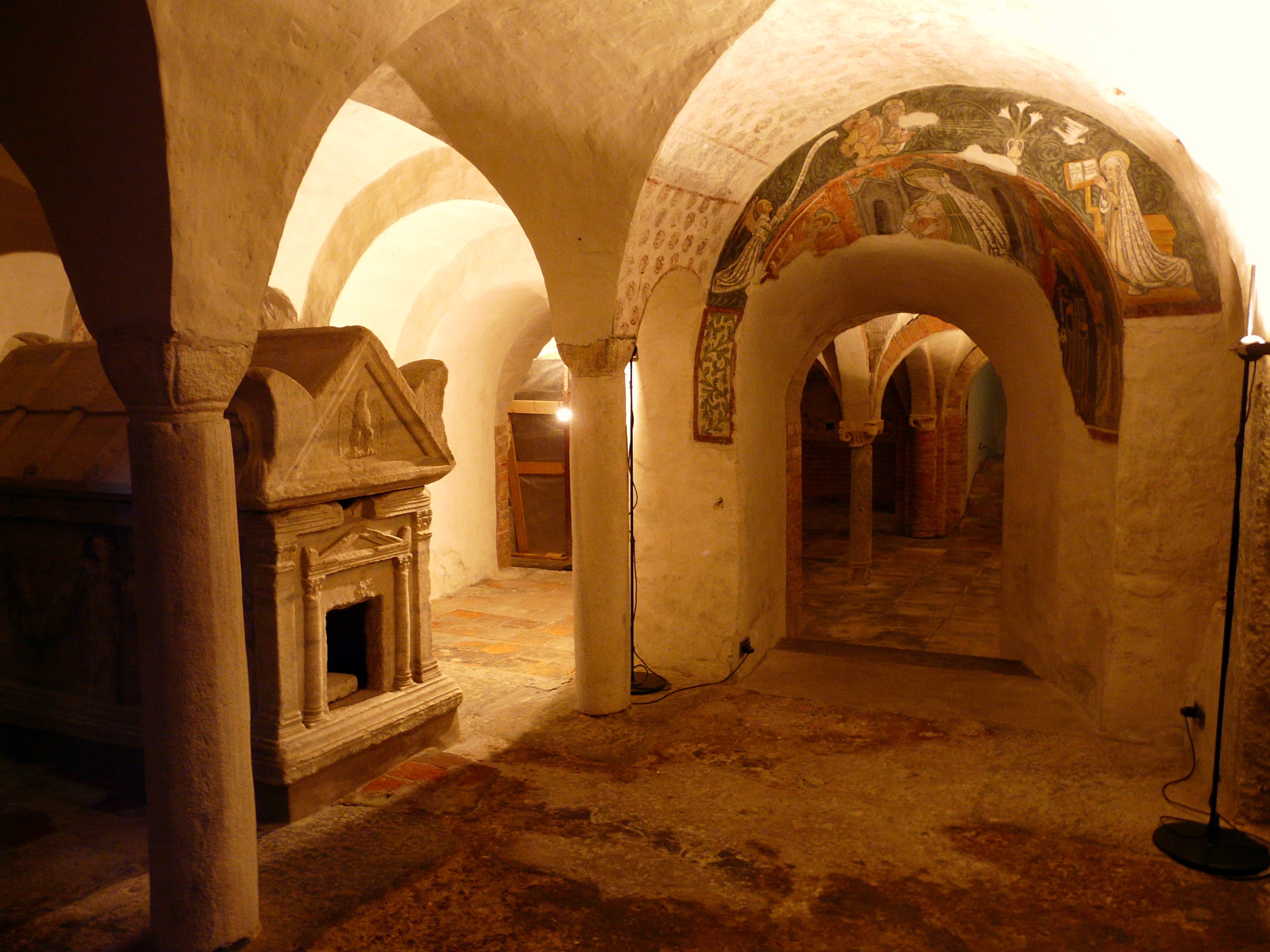 Interno della cripta del duomo di Ivrea, Piemonte, Italia